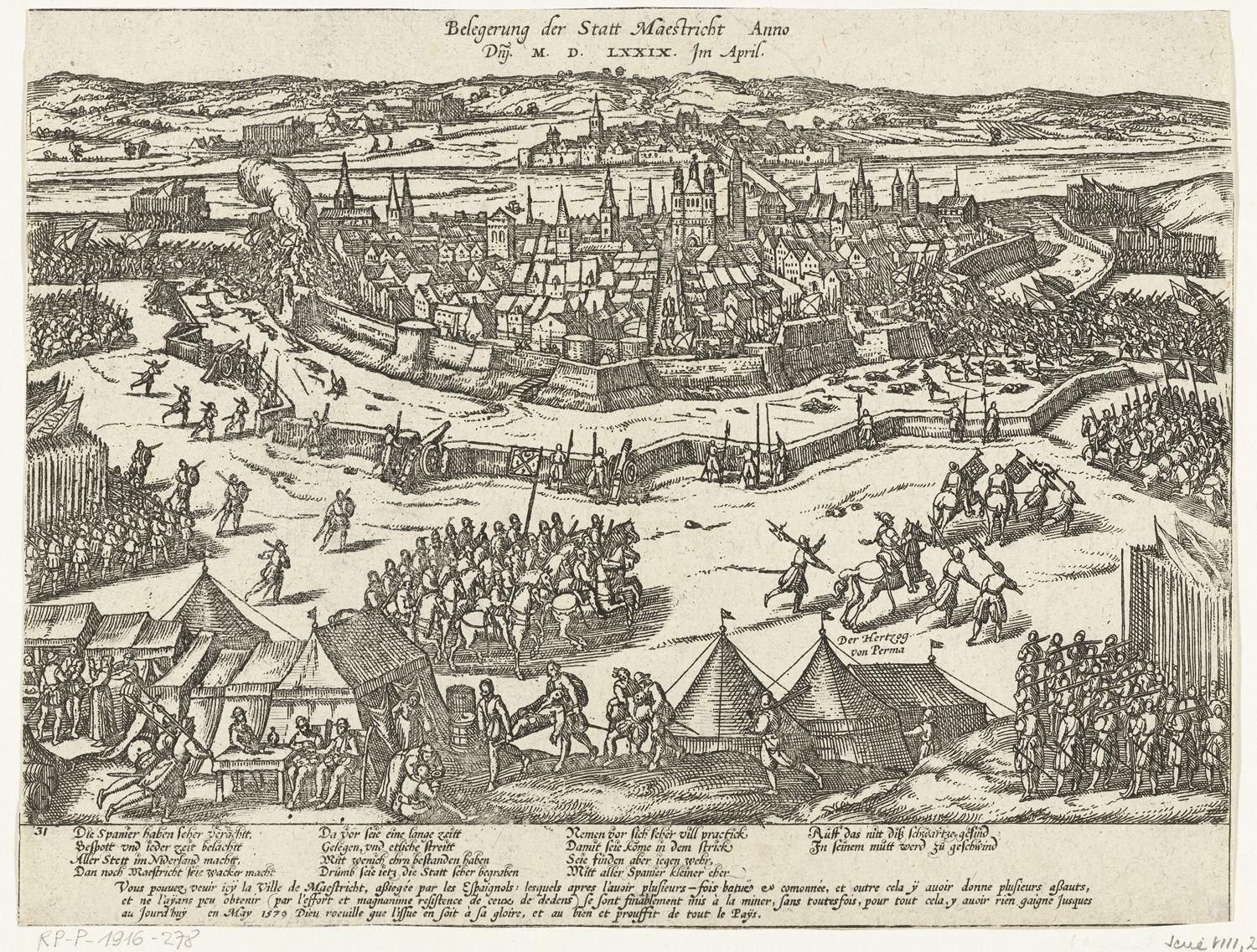 Siege of Maastricht (1579)